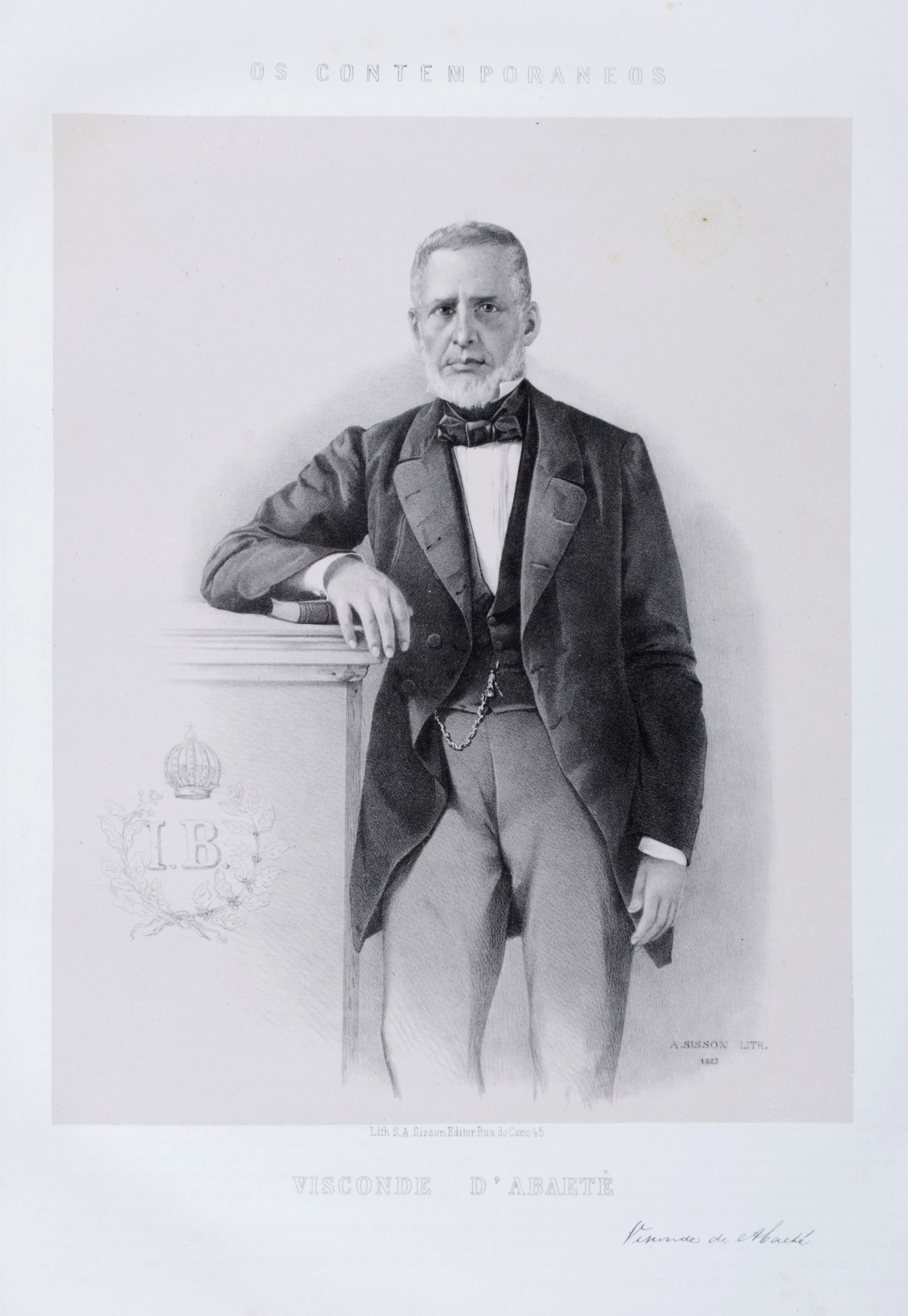 Litografia em preto e branco